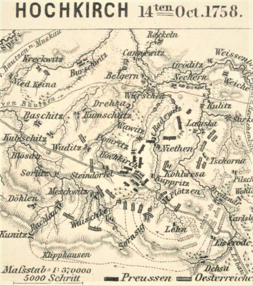 Schlachtplan von Hochkirch